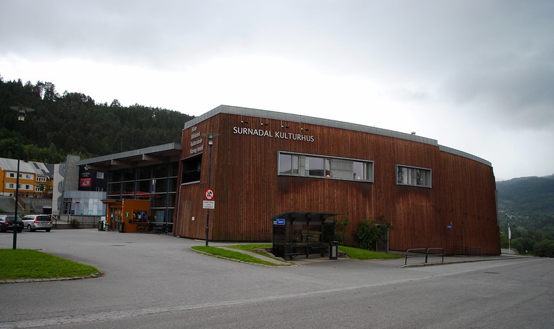 Kulturhus